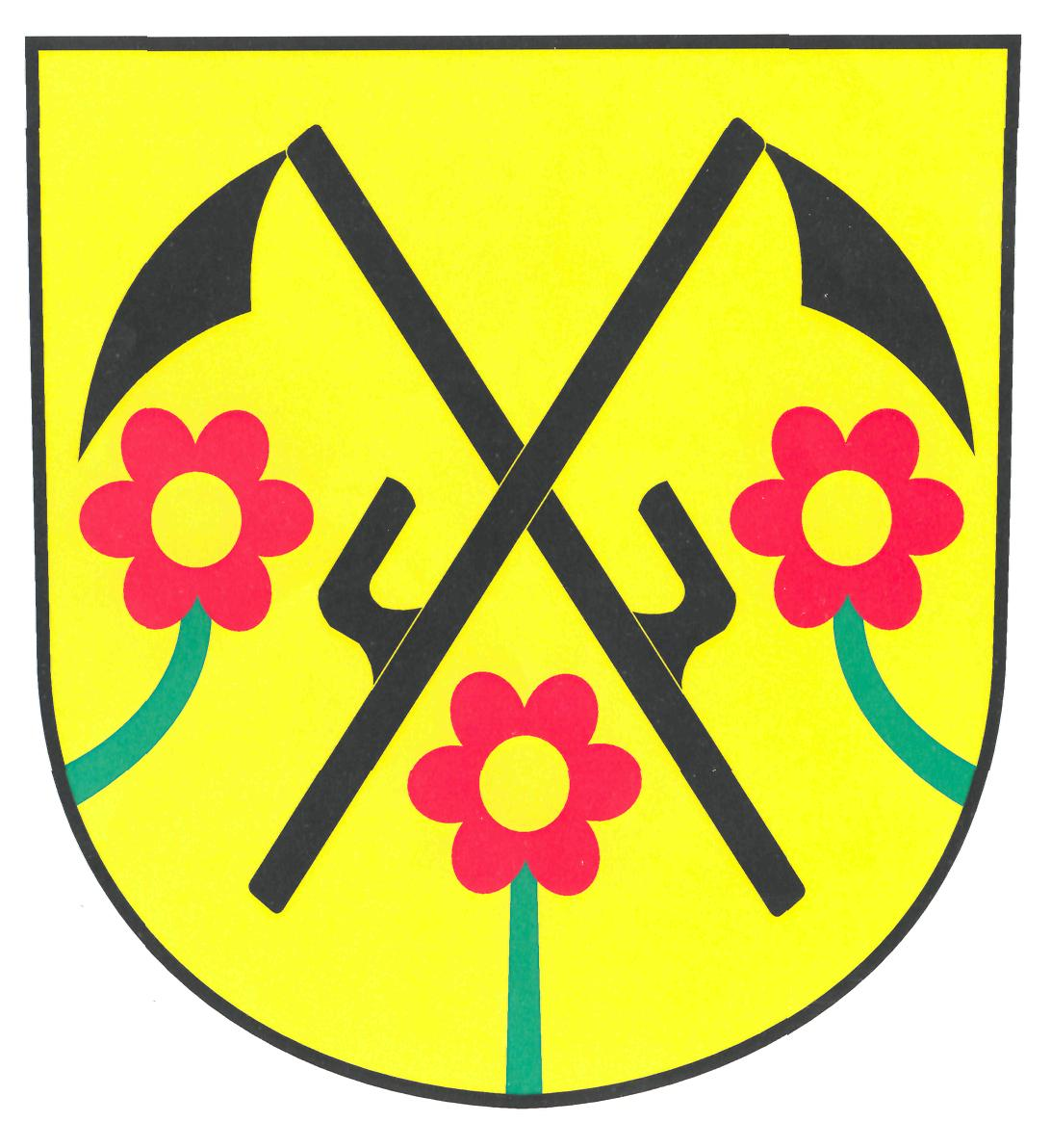 Znak obce Sentice